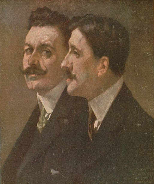 Hermanos Álvarez Quinterotitle QS:P1476,es:"Hermanos Álvarez Quintero" label QS:Les,"Hermanos Álvarez Quintero"